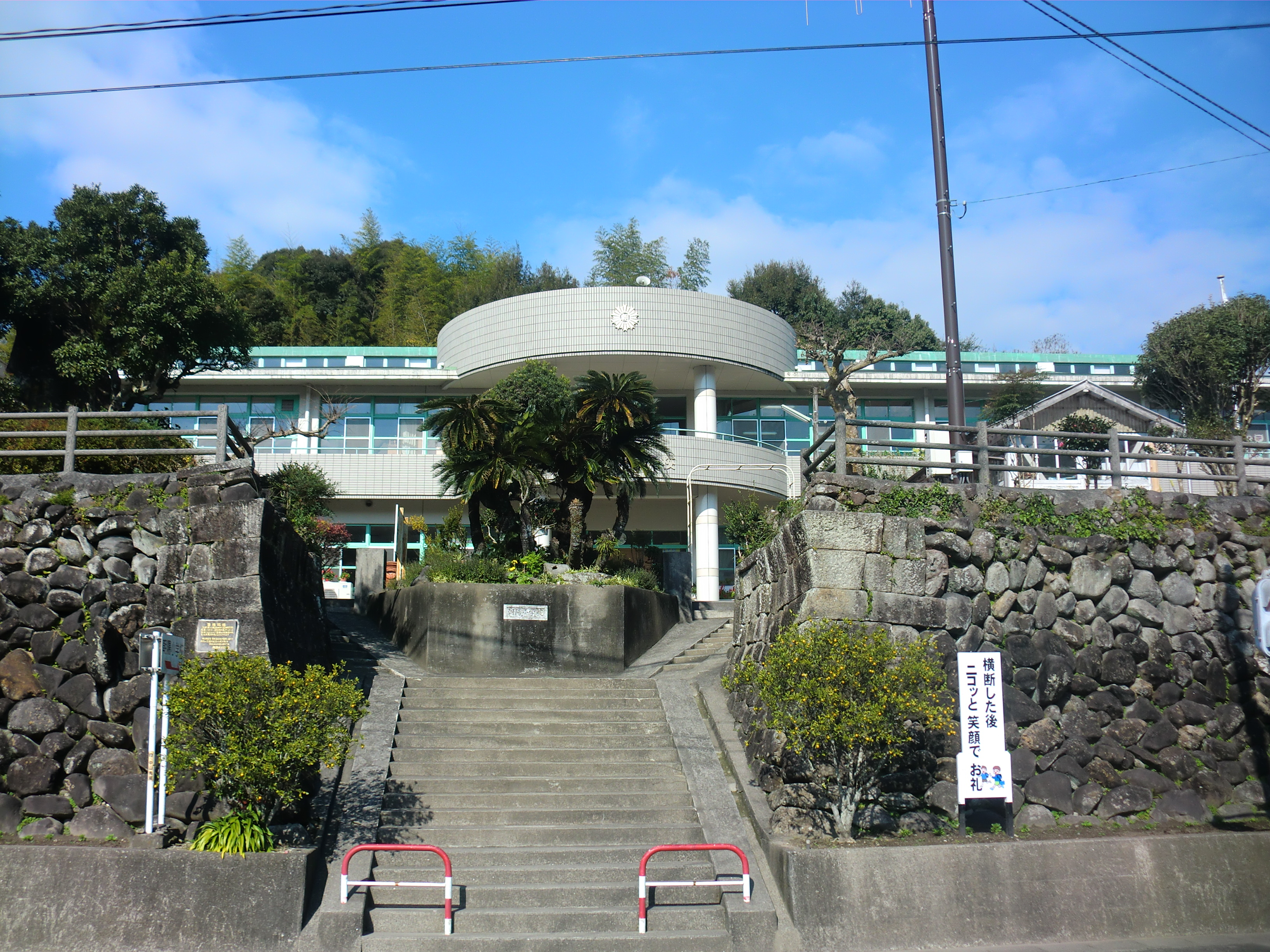 薩摩川内市にある薩摩川内市立朝陽（ちょうよう）小学校